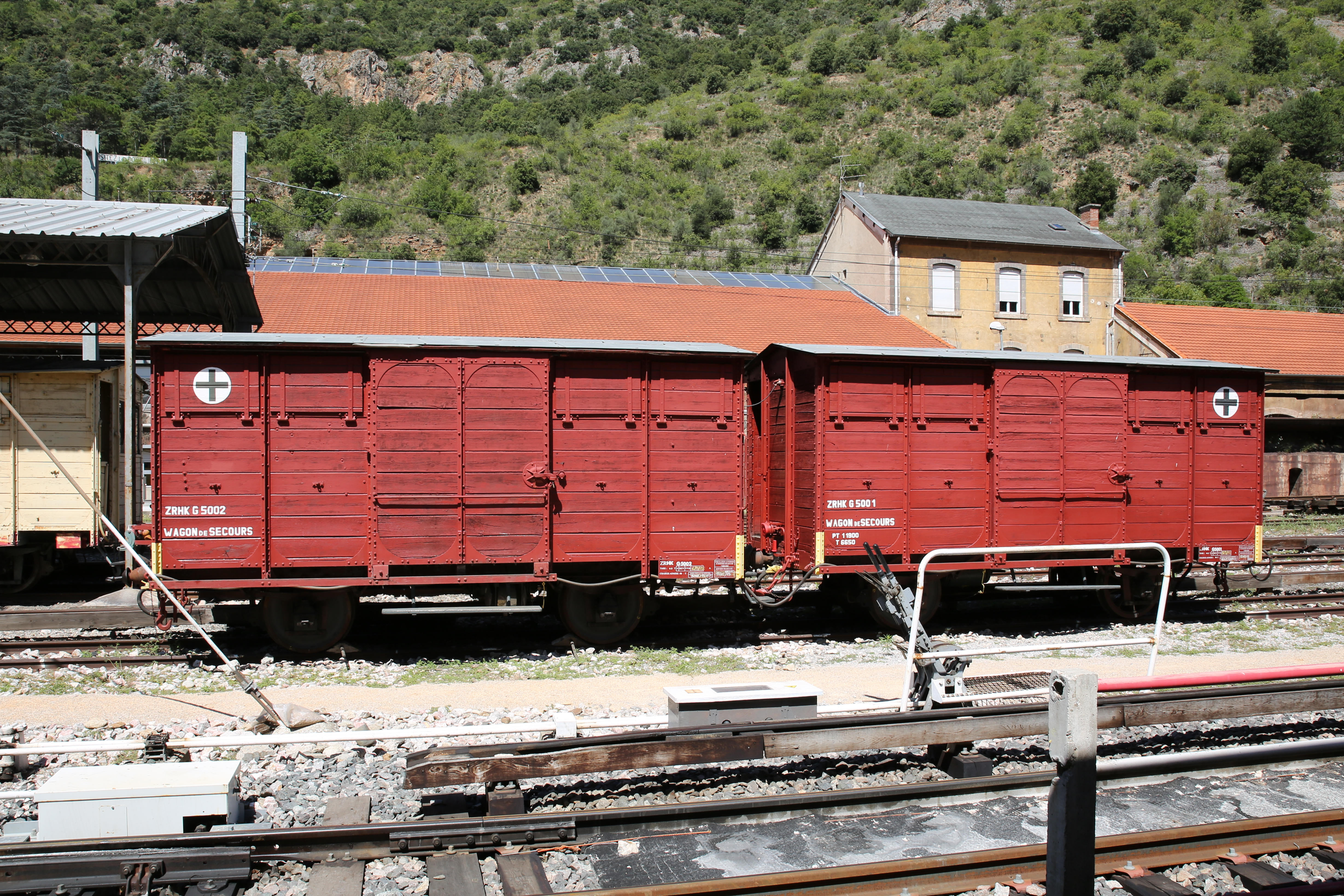 Dépôt de Villefranche-de-Conflent